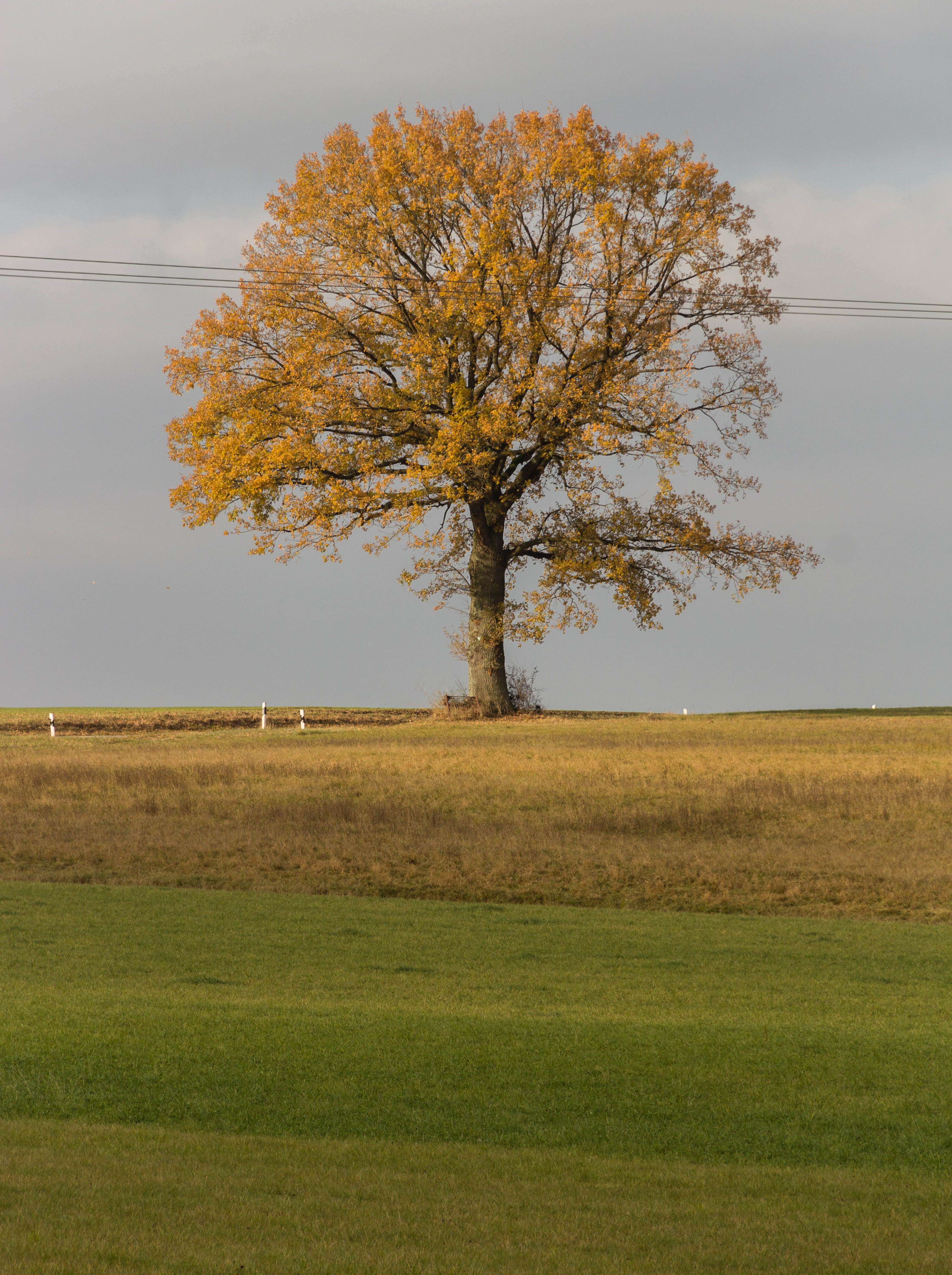 Futterspiel Eiche, Naturdenkmal, Dörlbacher Au